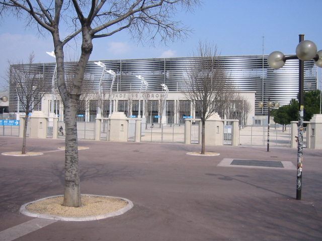 Stade de Football de Marseille